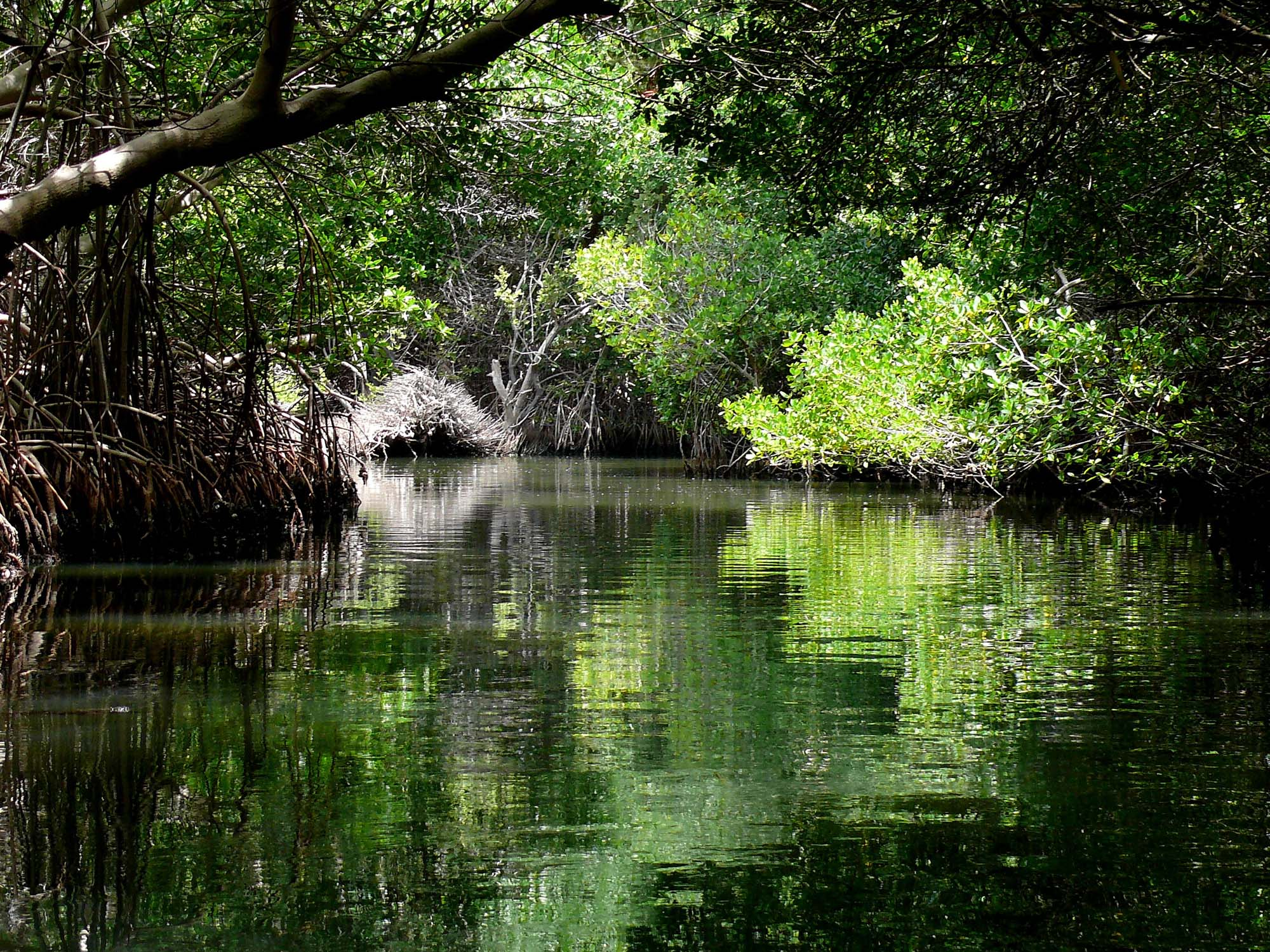 Paseo por La Restinga Edo. Nva. Espatra